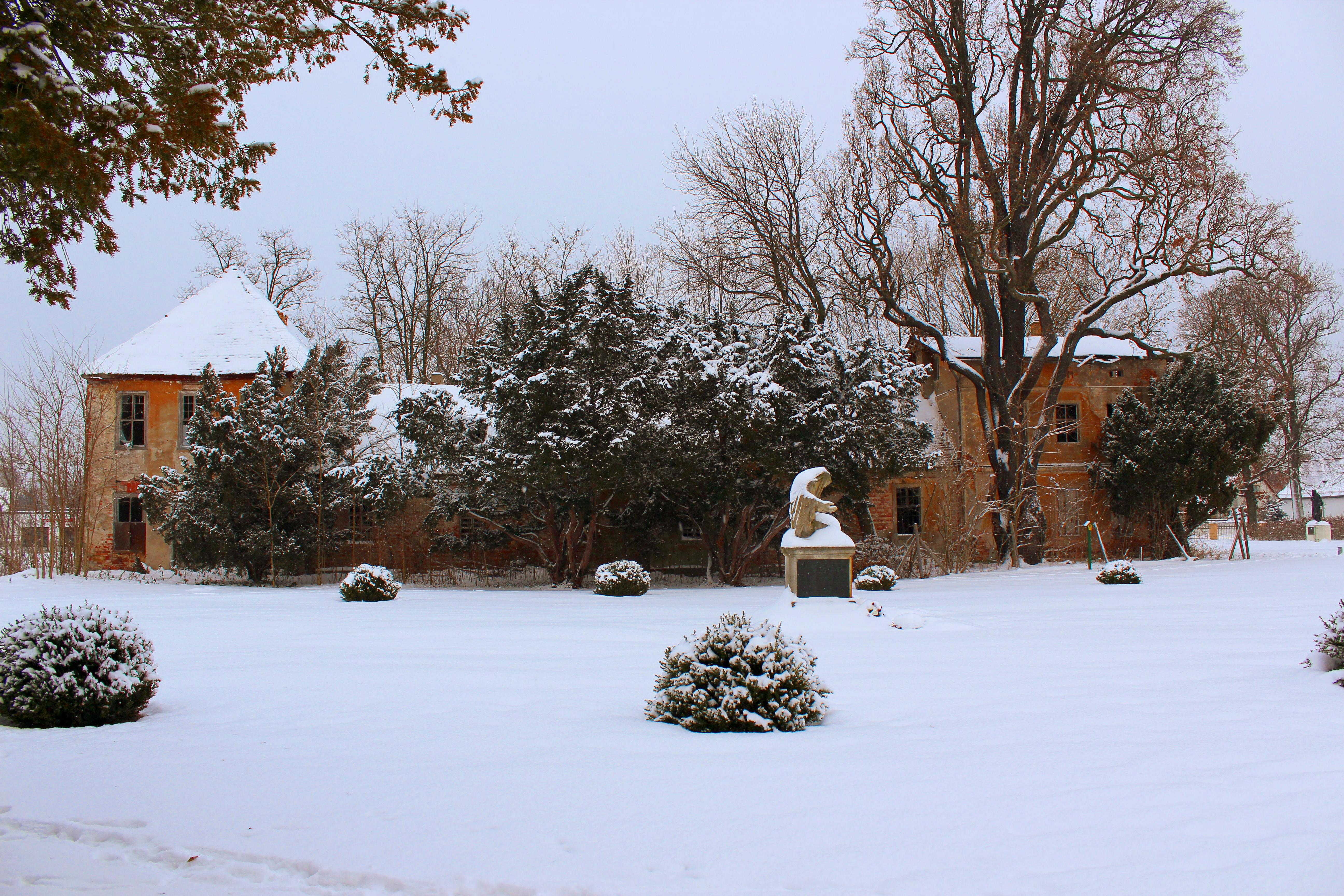 Orangerie des einstigen Schlosses Mückenberg.